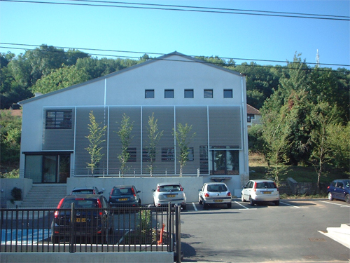 picture of our building LOMACO (Groupe FIdeciel) autorisation FIDECIEL